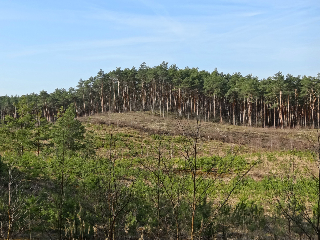 Puszcza Bydgoska w okolicy Bydgoskiego Parku Przemysłowo-Technologicznego